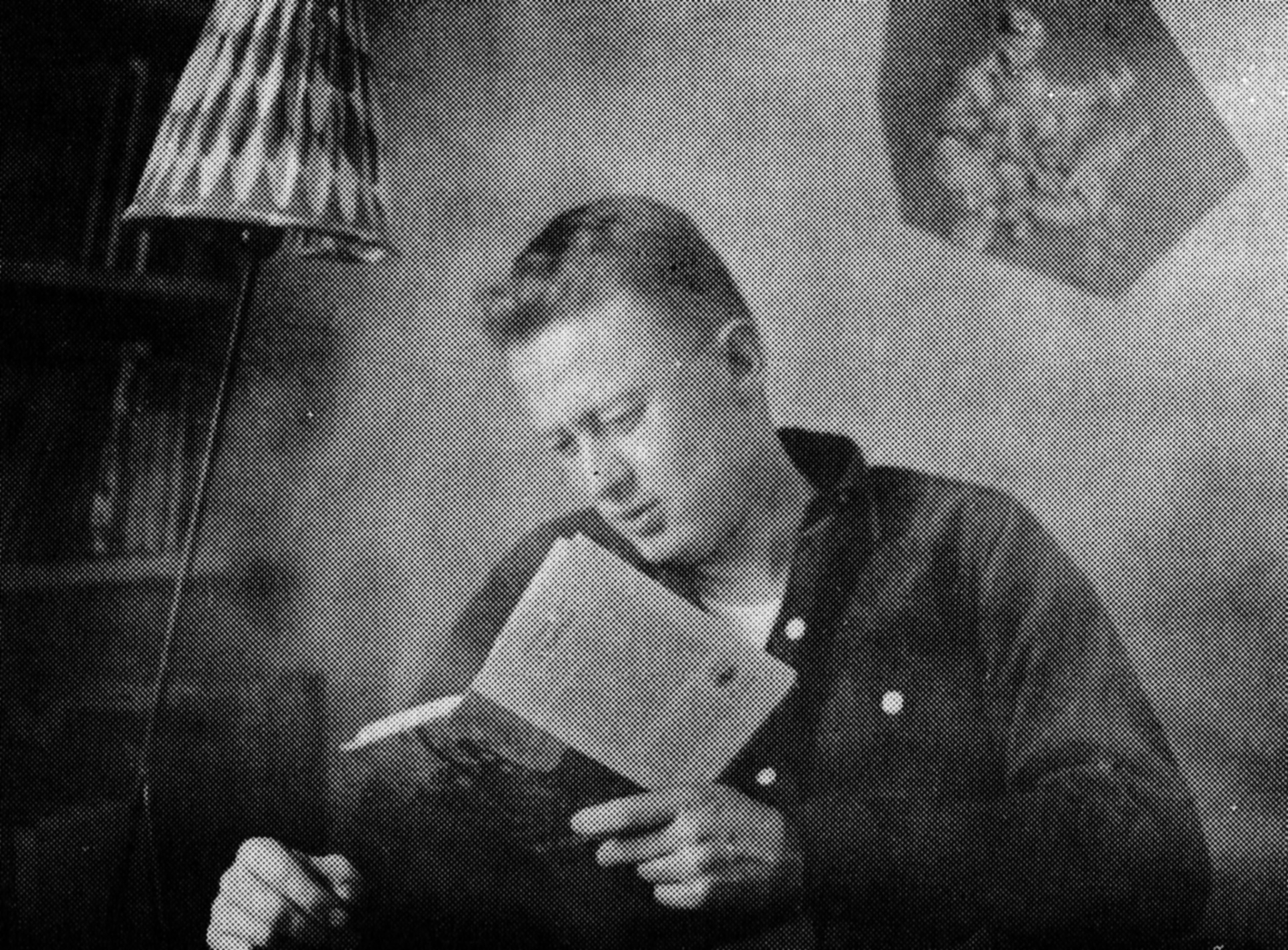 Ove Allansson (1932-2016)